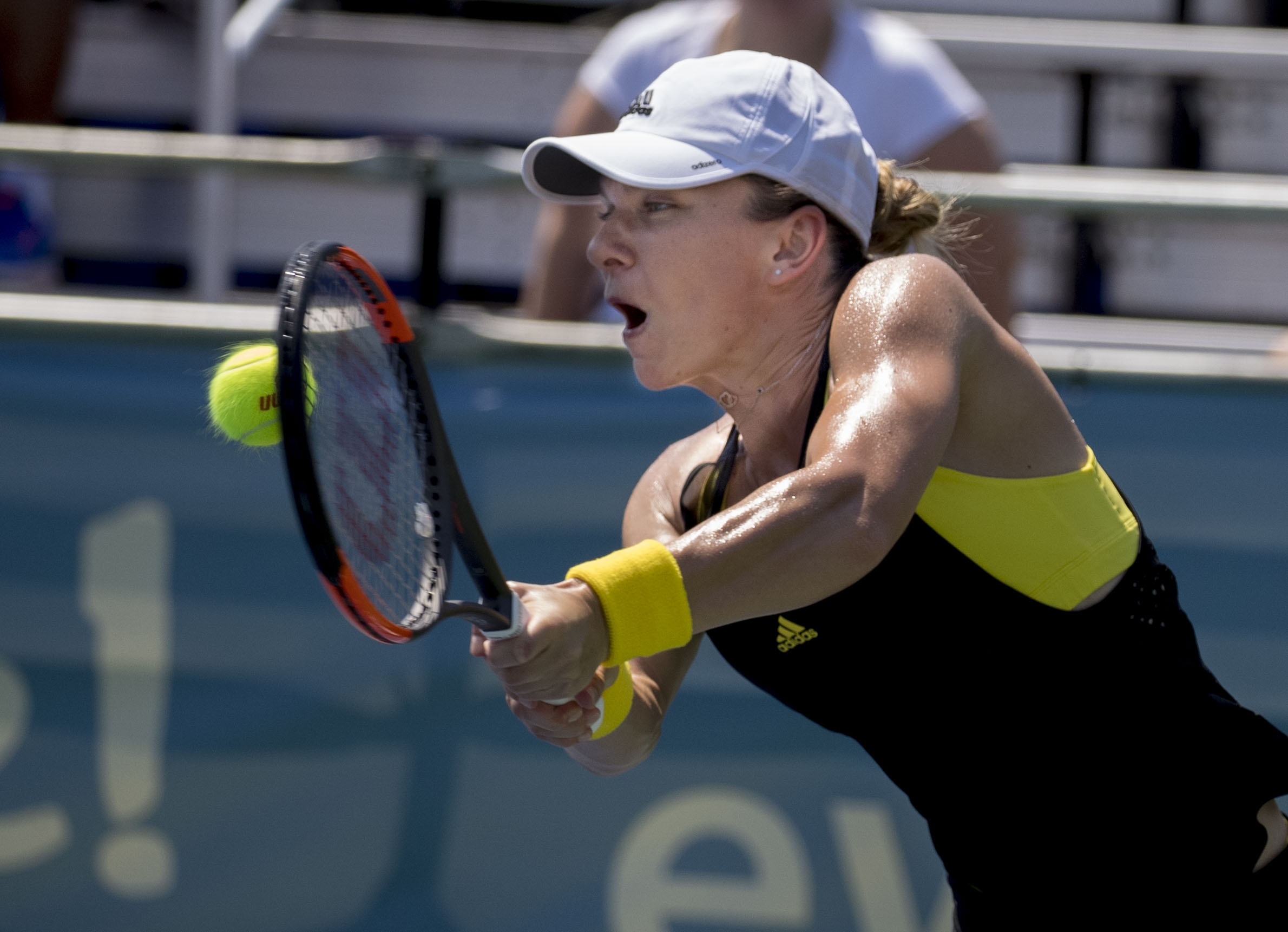 Citi Open Tennis 2017